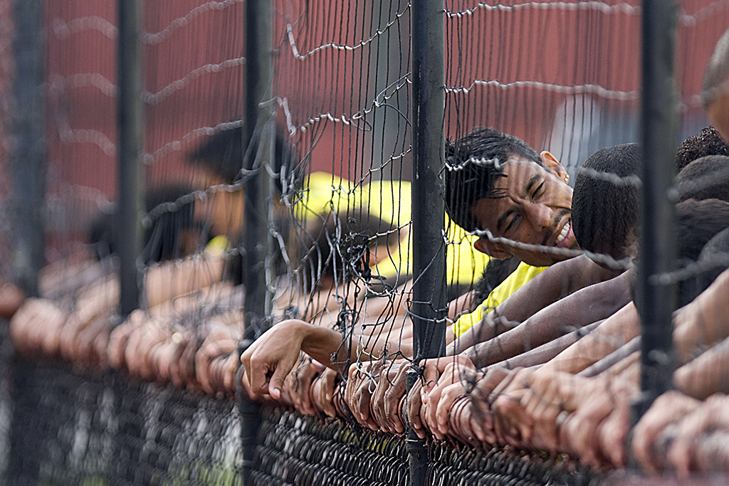 CRF - CT da Gávea